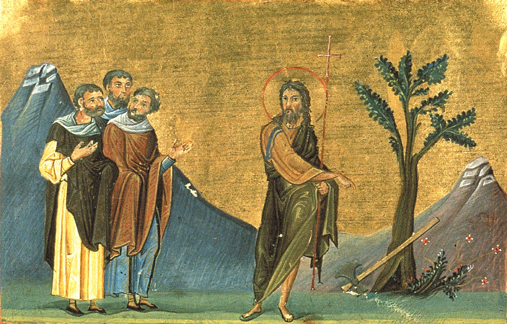 Собор Предтечи и Крестителя Господня Иоанна Миниатюра Минология Василия II. Константинополь. 985 г. Ватиканская библиотека. Рим